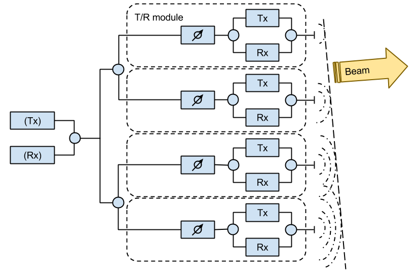 アクティブ・フェーズドアレイ・アンテナのメカニズム。